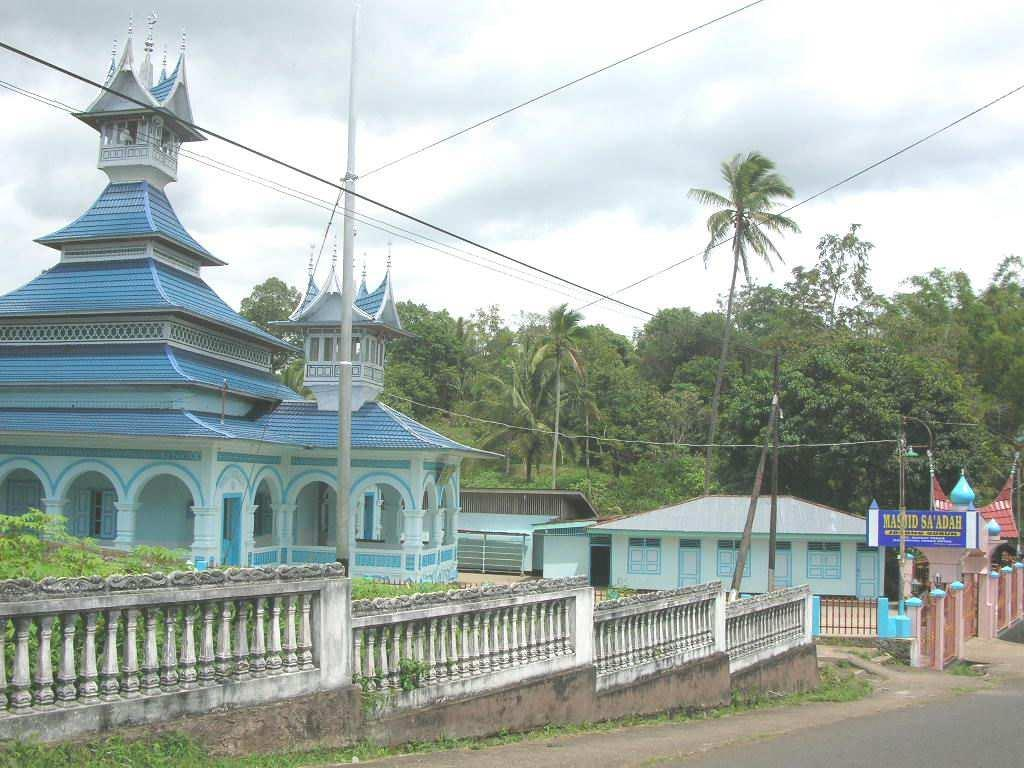 Cagar budaya Masjid Saadah